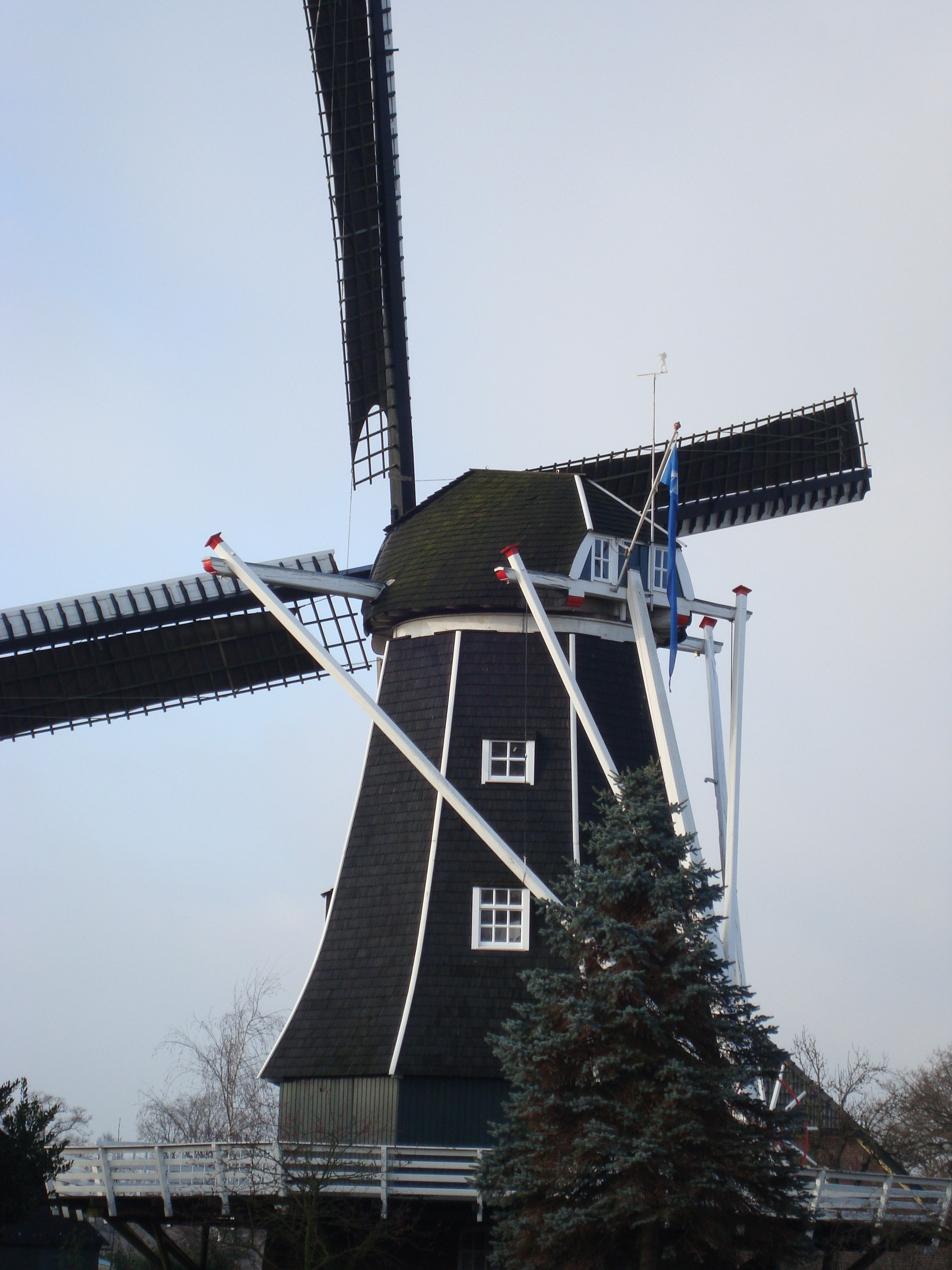 Molen "Benninkmolen in Doetinchem, Nederland